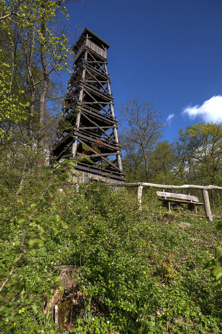 Wanfried auf der Plesse, "Der Plesseturm" Blick von West